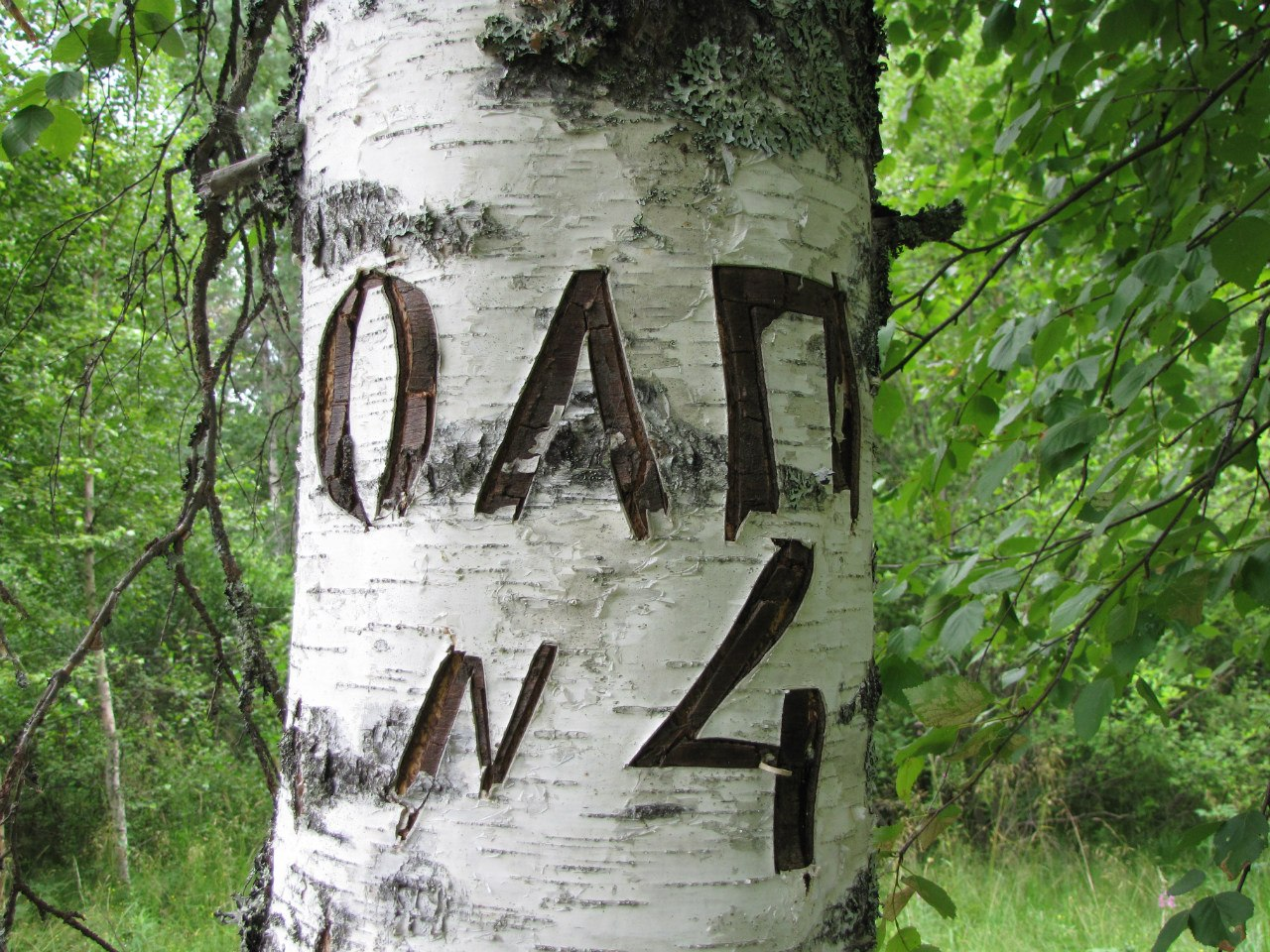 метка на березе, ОЛП 4